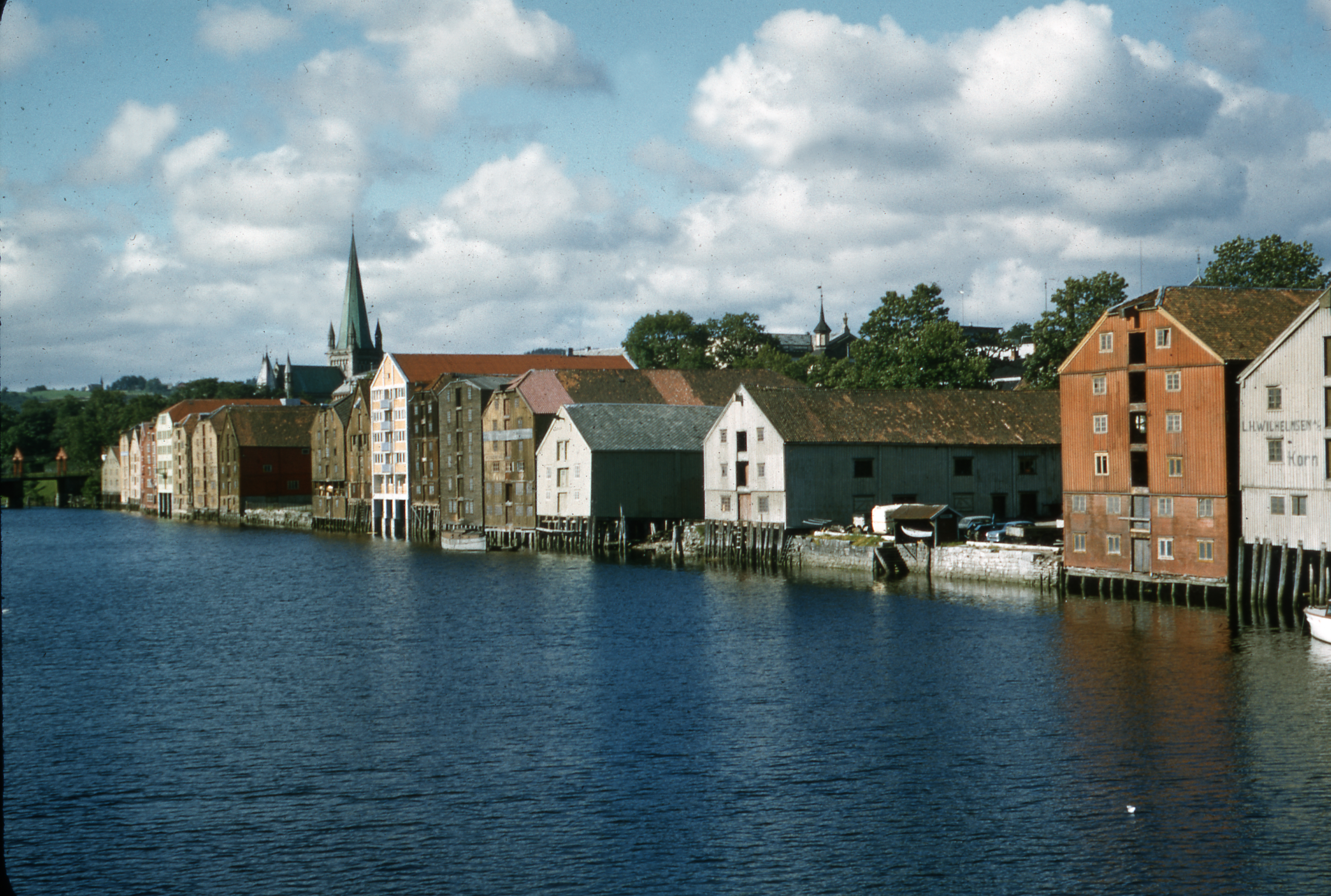 Format: Glasspositiv (Dias) Dato / Date: ca. 1954 - 1968 Fotograf / Photographer: Johan Alme (1909 - 1995) Sted / Place: Trondheim Oppdatert / Update: 16.12.2015 [fotograf identifisert] Google Street View: Bryggene ved Nidelva Eier / Owner Institution: Trondheim byarkiv, The Municipal Archives of Trondheim Arkivreferanse / Archive reference: Tor.H43.B77.F18547 Merknad: Fra Byantikvarens lysbildesamling. Bildene er tatt av Johan Alme (1909 - 1995) og er donert til Trondheim kommune av Tore Sørung. Johan Alme var butikksjef hos Kjeldsberg i Olav Tryggvasons gate og senere bestyrer i forretningskjeden Easy A/S. Bildene er merket Trondheim 1954 - 1968.